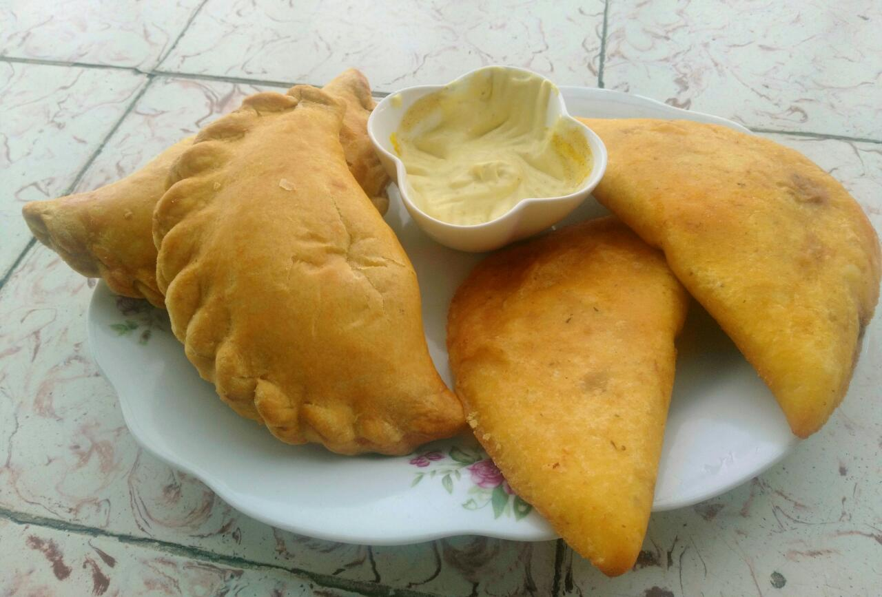 Empanadas costarricenses típicas (trigo y maíz): rellenas de carne con pasas y de pollo con papas. Servidas con mayonesa arreglada.